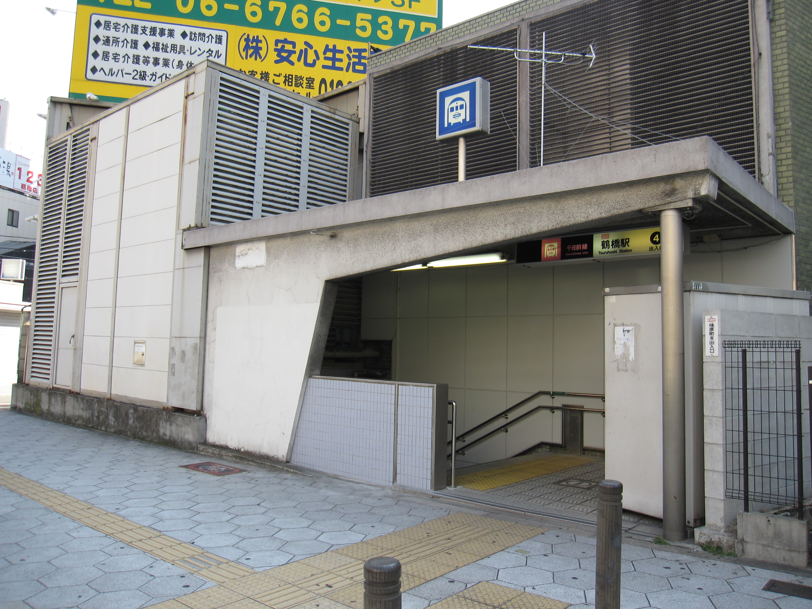 大阪市営地下鉄千日前線鶴橋駅